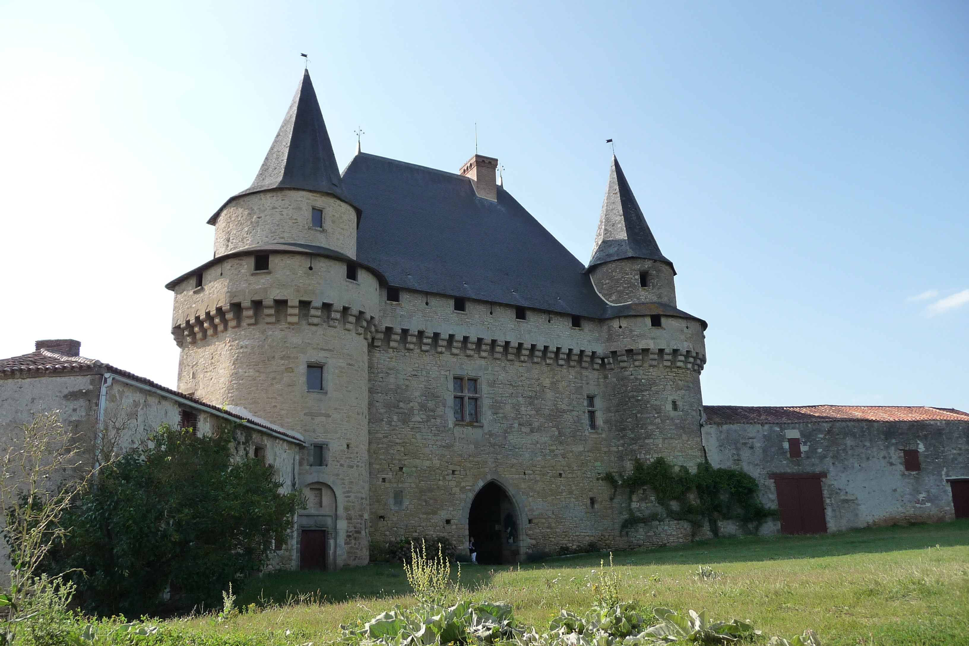 This building is en partie classé, en partie inscrit au titre des Monuments Historiques. .